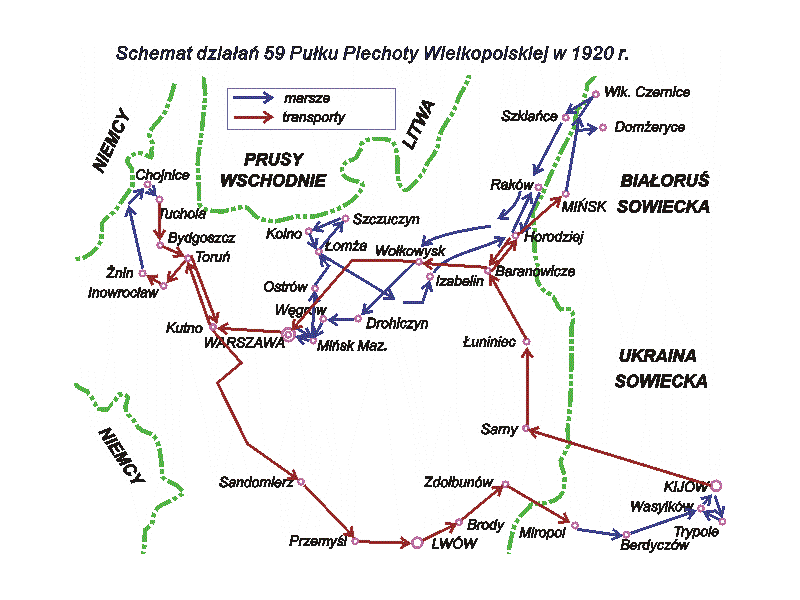 Schemat działań 59 Wielkopolskiego Pułku Piechoty w 1920 r.